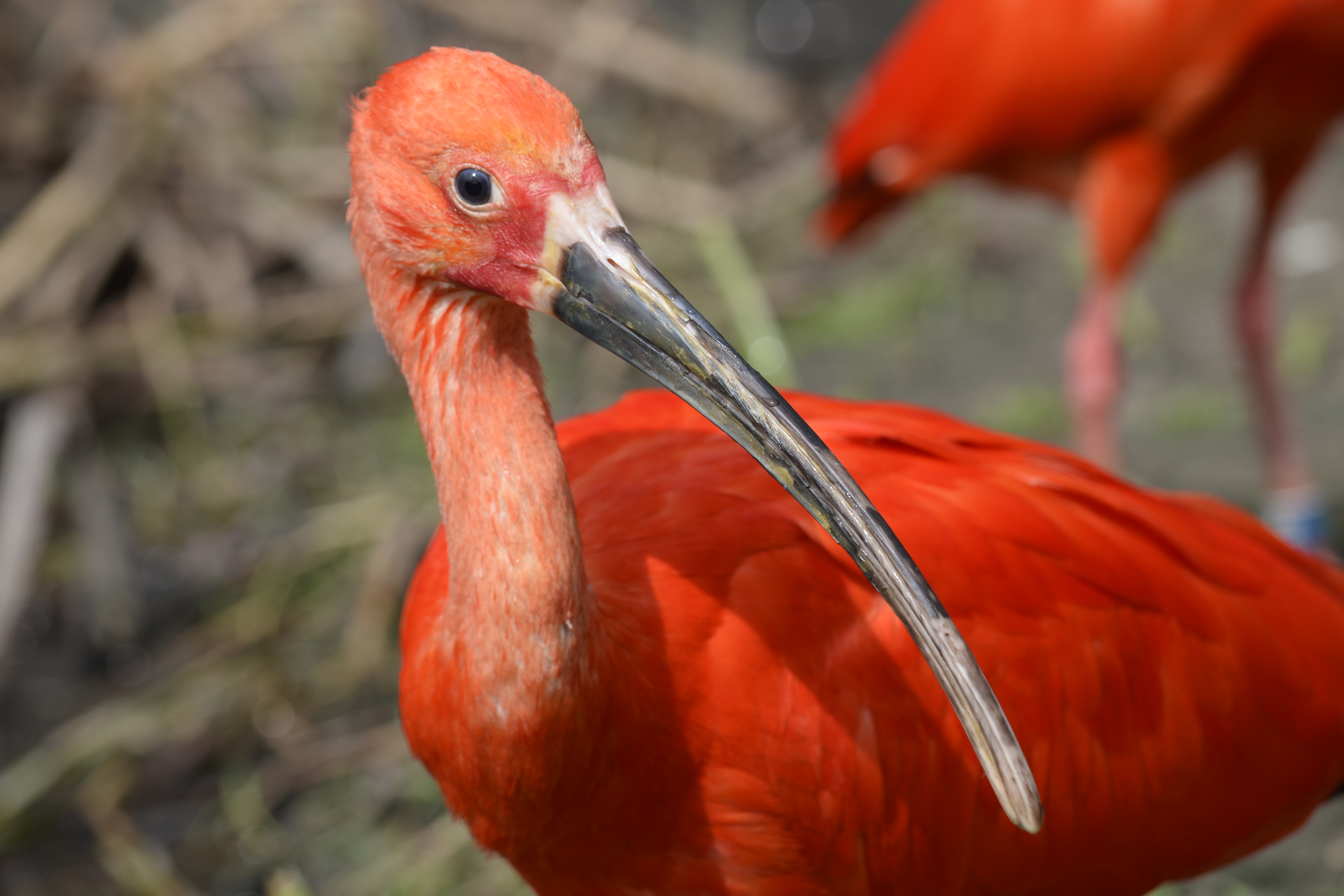 Scarlet Ibis